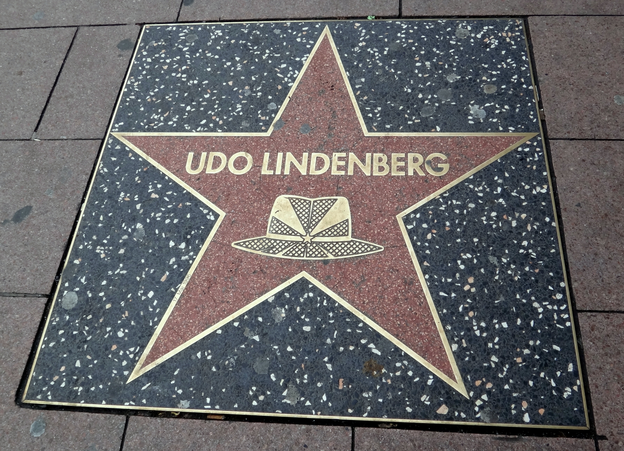 Für Udo Lindenberg/Udo Lindenberg wurde ein Stern in den Gehweg der Hamburger Reeperbahn eingelassen, ein "Walk of Fame" direkt vor dem Café Keese.